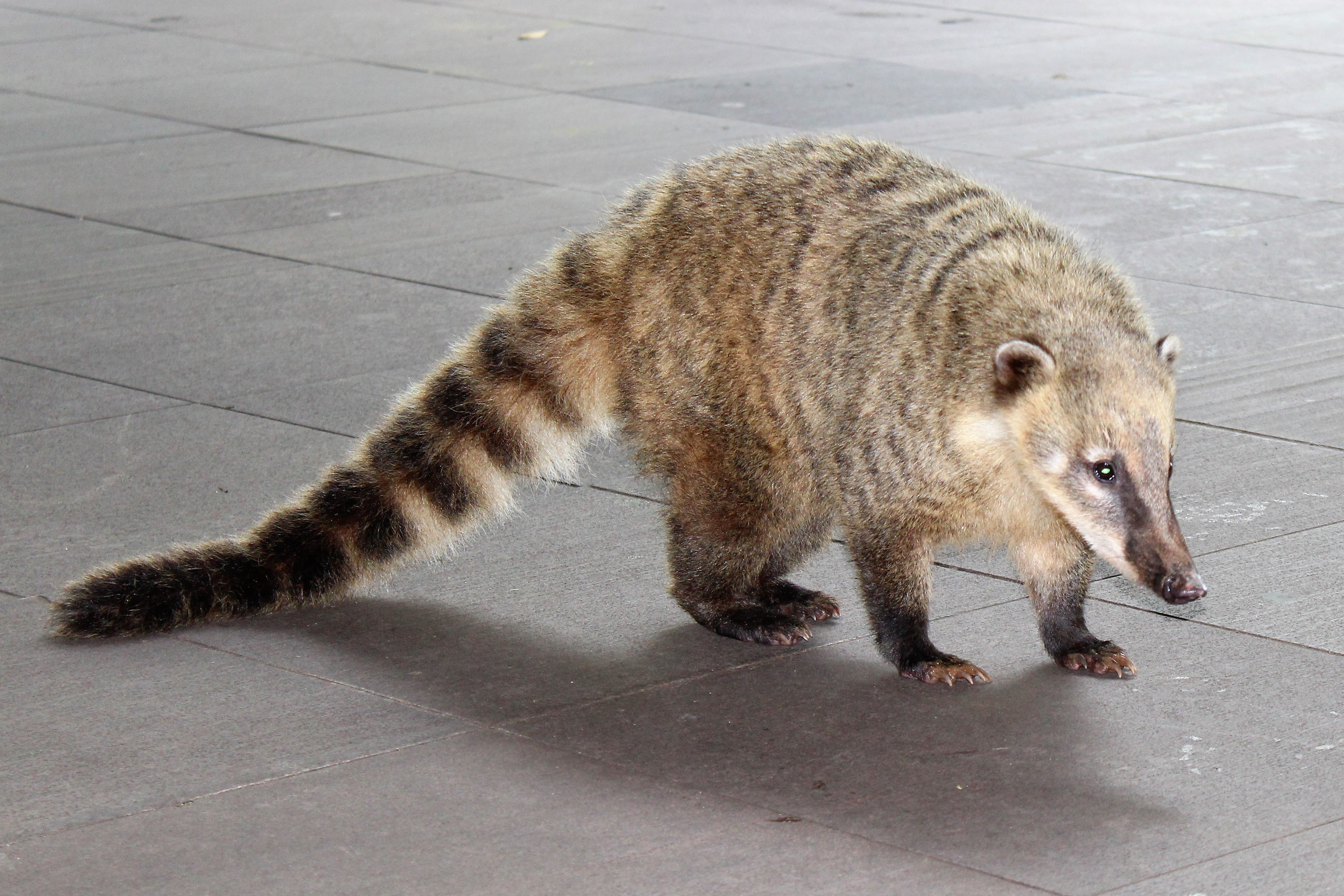 O quati é um mamífero carnívoro que circula livremente no Parque Nacional de Iguaçu em busca de alimento.